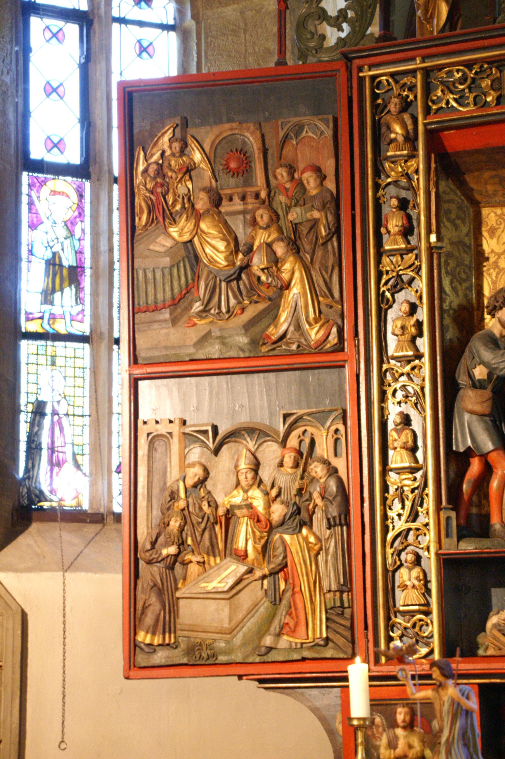 Martinsaltar St.-Martinskirche (Stöckenburg). Linke Flügeltür (Innenseite).